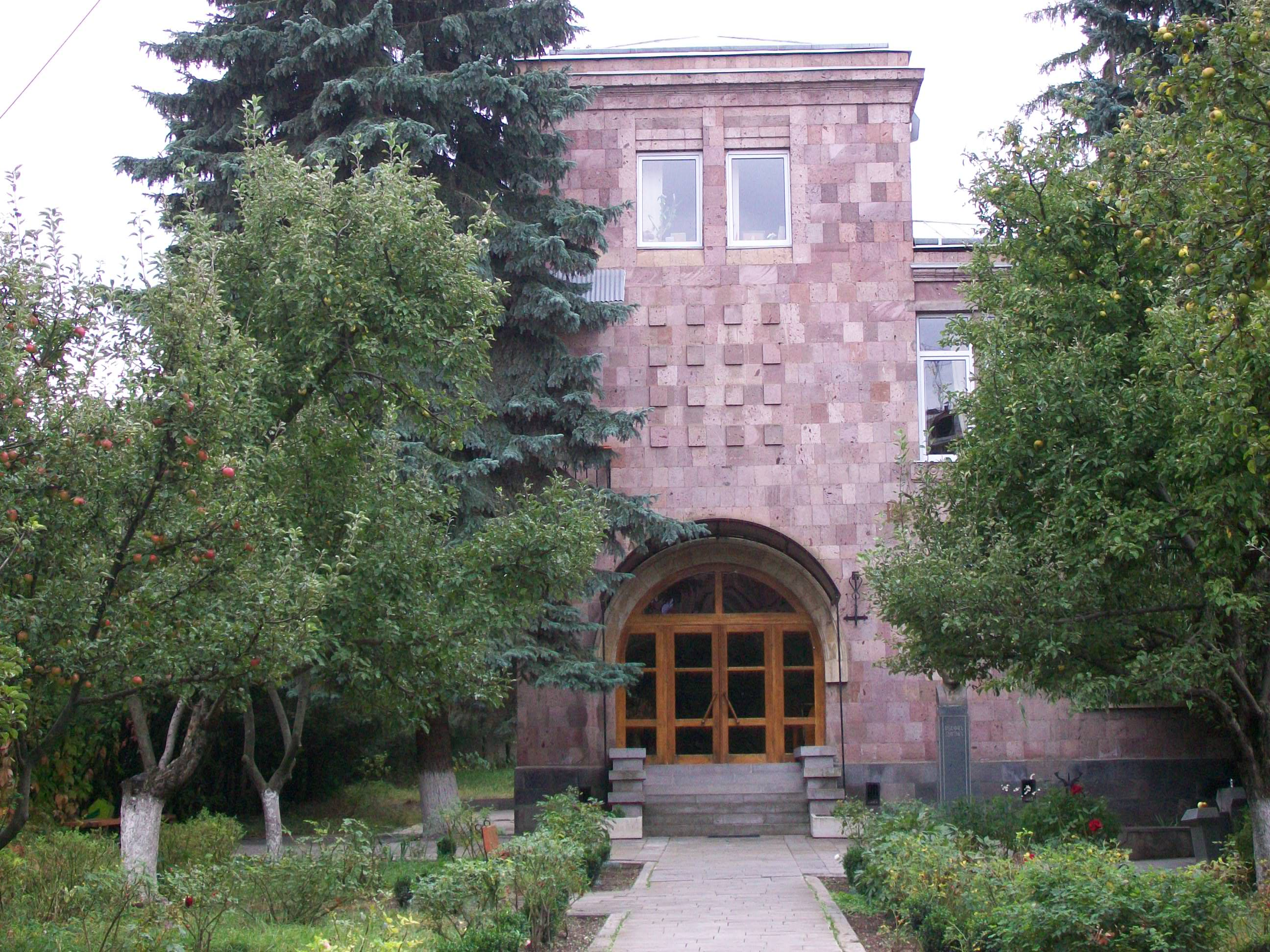 Ստեփան Զորյանի տուն-թանգարան, ք. Վանաձոր, 1980-ական թթ. 1/50